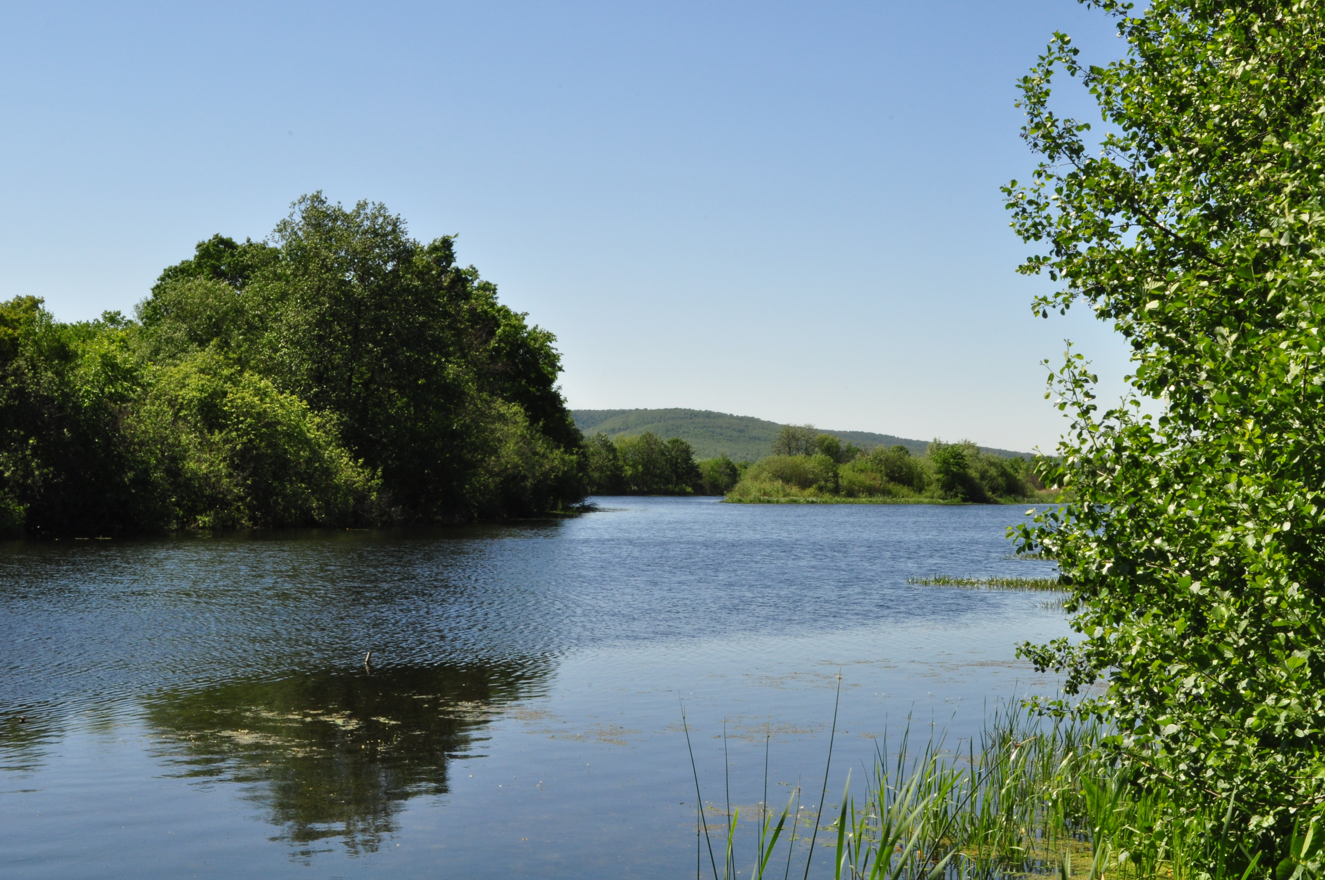 Озеро Чевань эрьке, Кочкуровский район This image is related to the protected area of Russia number 1310073